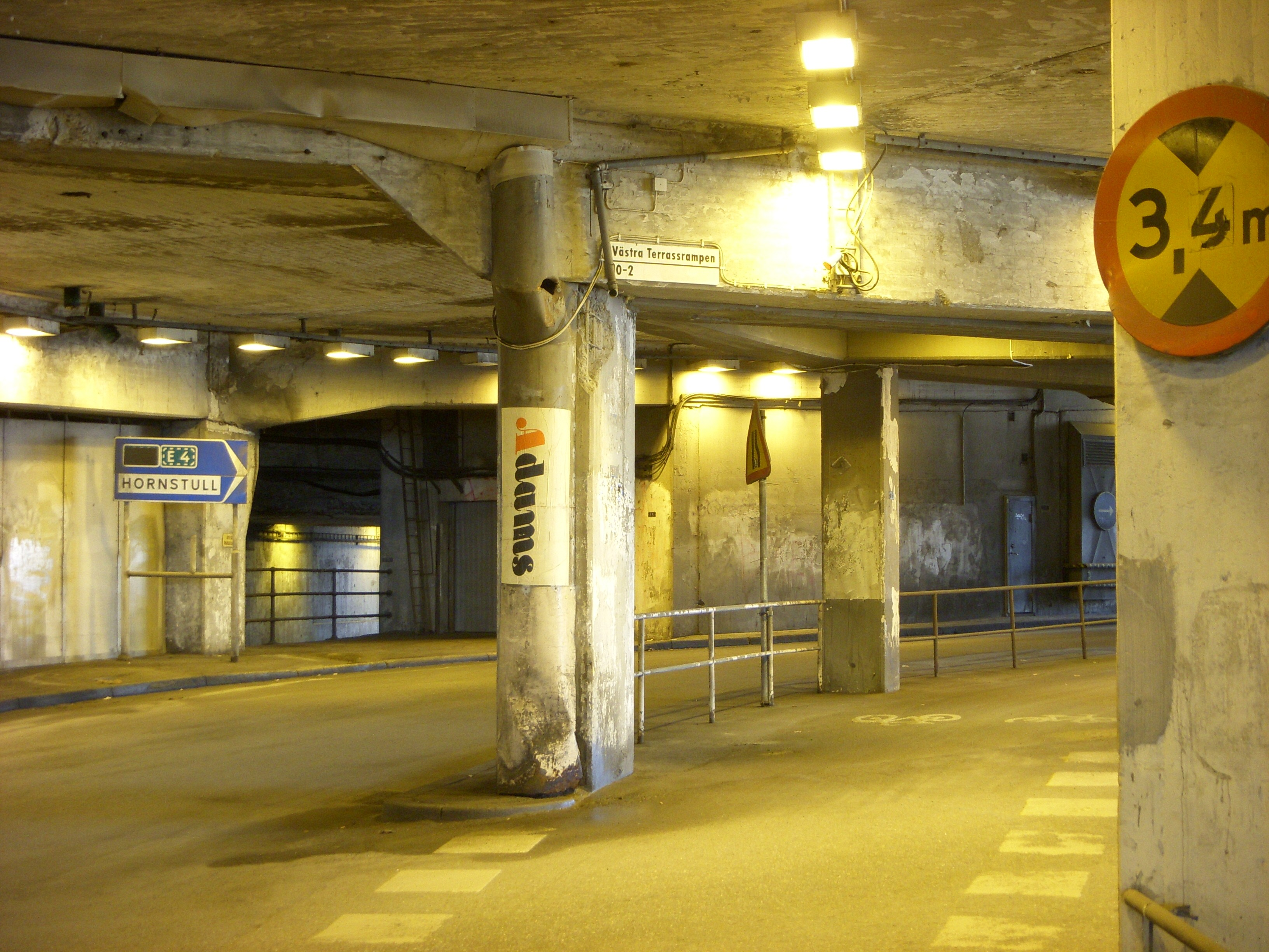 Slussen, Stockholm, inventering april 2009